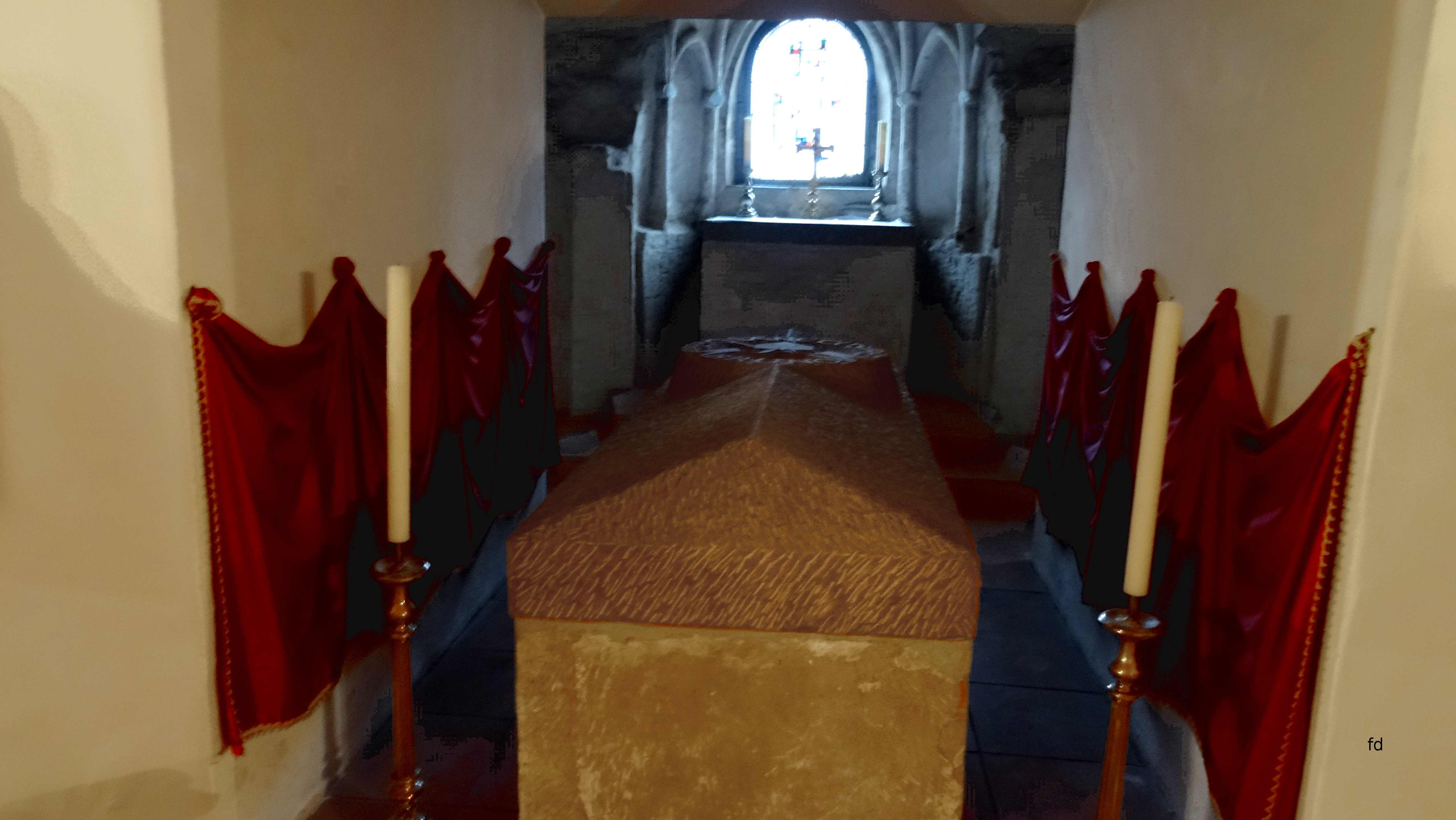 Brun (Bruno)von Köln gründete 955 das Benediktiner Kloster St.Pantaleon